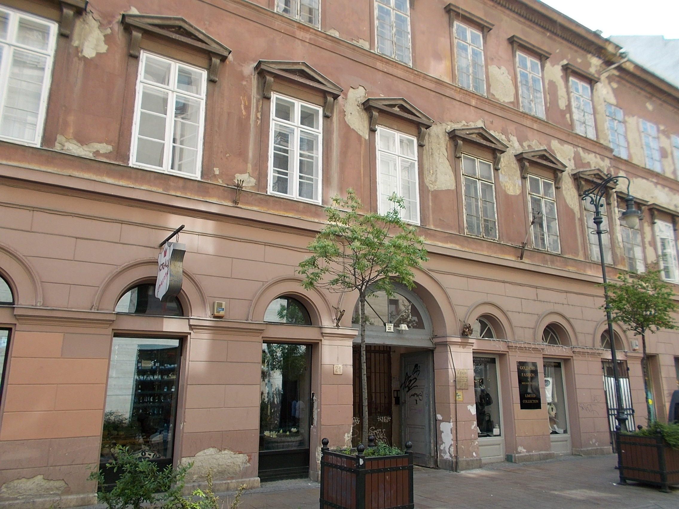 ‘Jó Pásztor’-ház (Dlauchy ház) néven volt ismert. Kétemeletes, klasszicista stílusú sarokház. Pollack Mihály építette 1833-ban Dlauchy Ferenc nevű lakatosnak. Helyreállítva 1956-57-ben Horler Miklós tervei alapján. Műemlék ID 842 - Budapest 6. kerület. Király utca 21. és Kazinczy u. 56 sarok. GPS 47.499950,19.059750